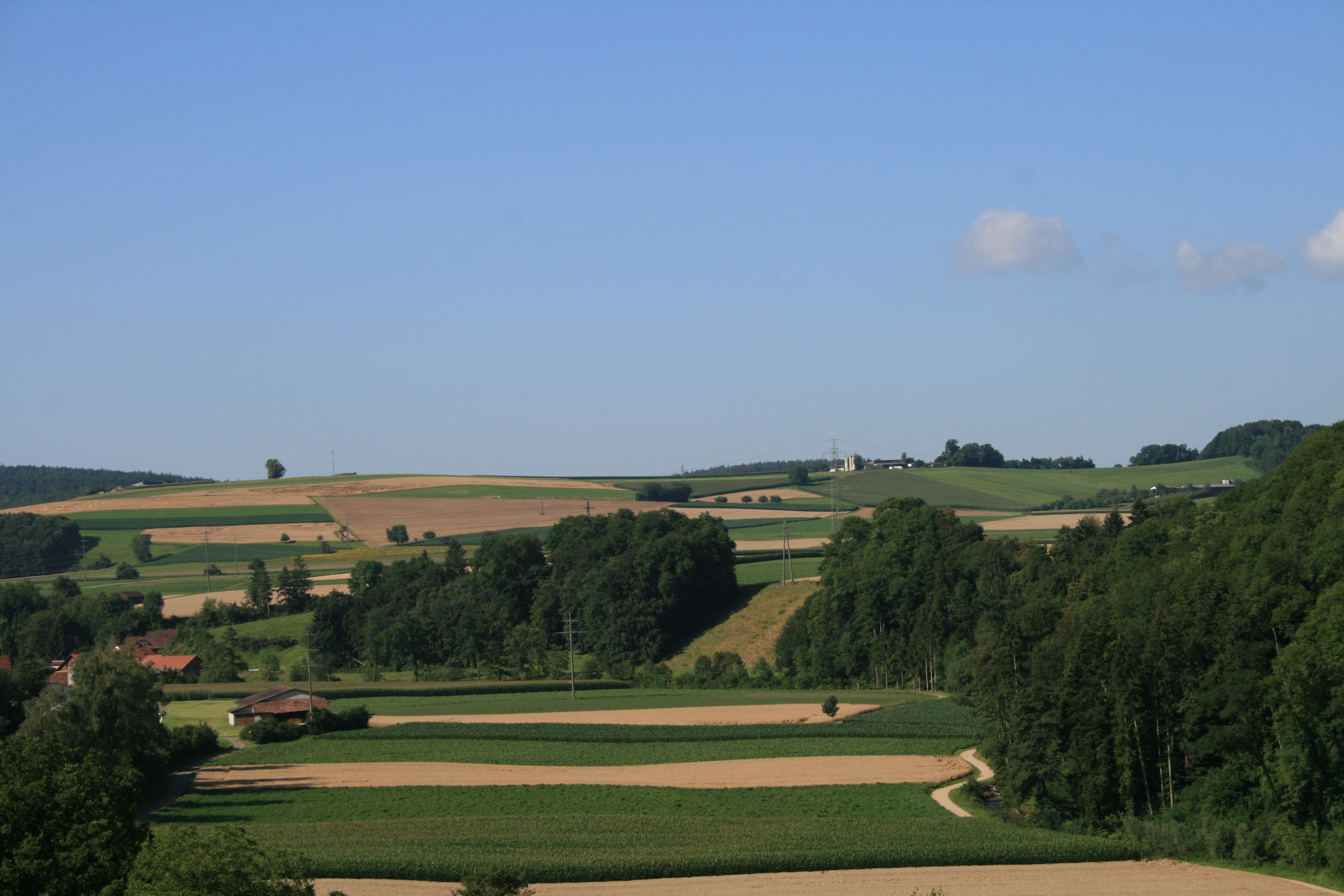 Surbtal: Blick von Tegerfelden Richtung Unterendingen, Schweiz